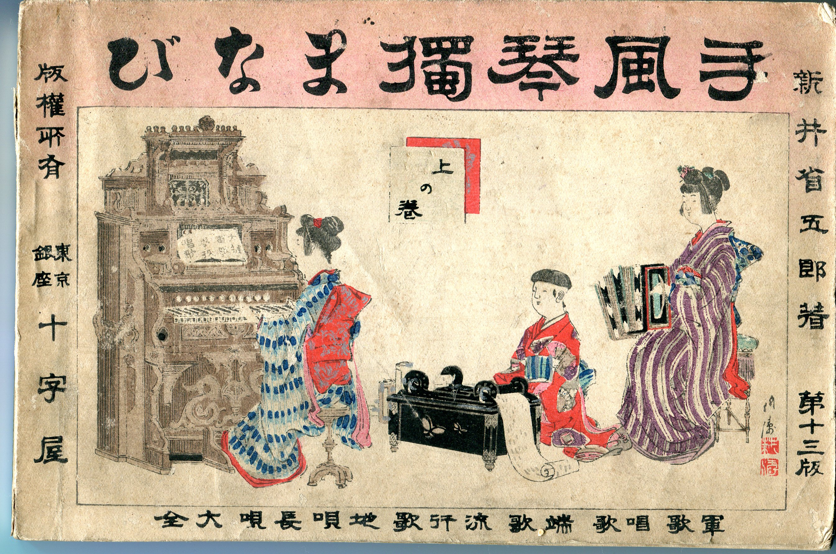 手風琴(アコーディオン)、紙腔琴(オルガネッタ)、リード・オルガンの合奏を楽しむ明治時代の婦女の絵。Ænglisc: Three women in kimono enjoy playing the harmonium (reed organ), the SHIKOUKIN (a kind of organetta imporved in Japan), and the diatonic accordion. This book was published in 1896, and 13th print in 1904.